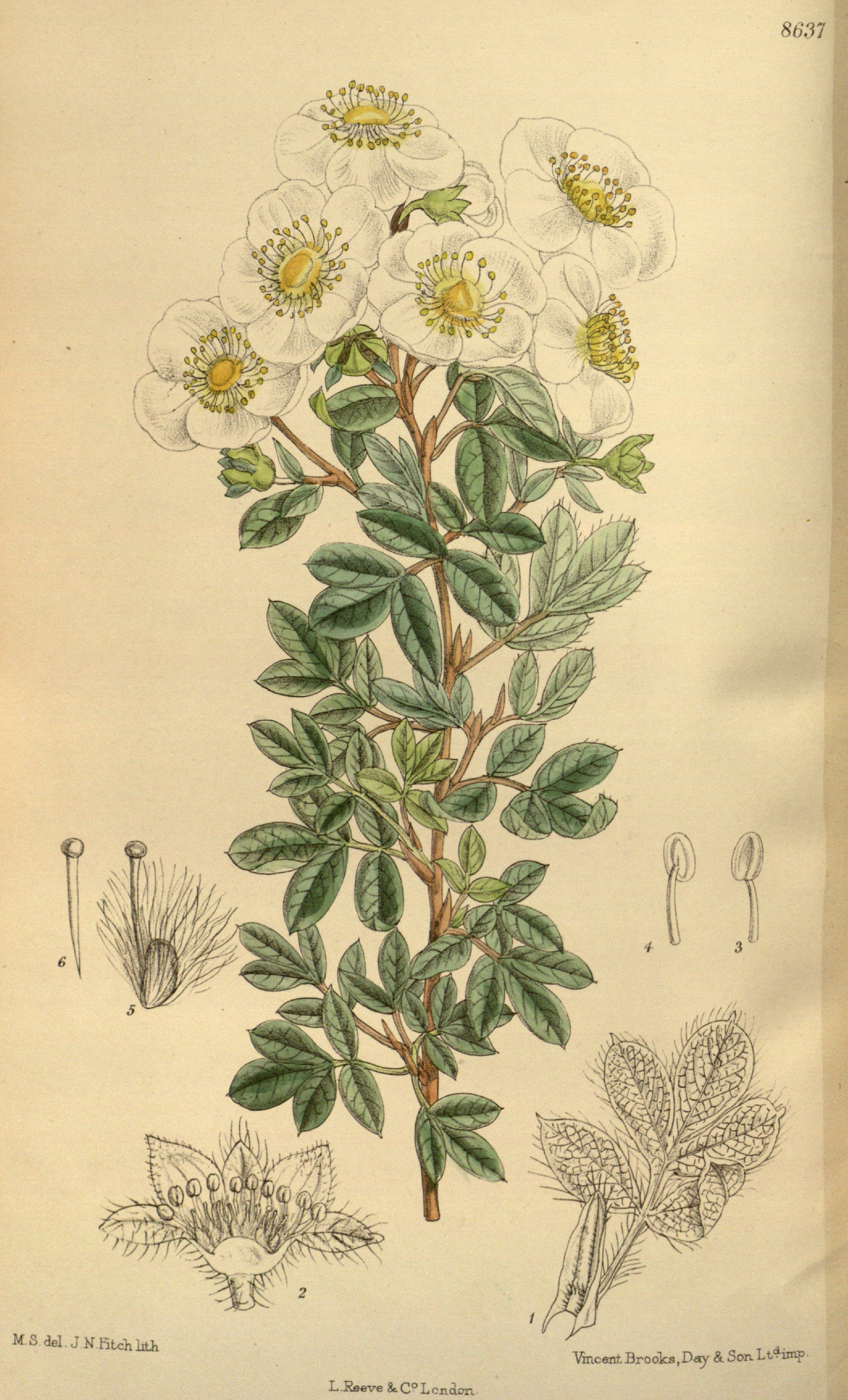 Potentilla davurica var. veitchii (= Dasiphora davurica), Rosaceae